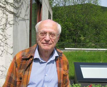 Jean-Pierre Serre, mathématicien français, à Oberwolfach en 2009